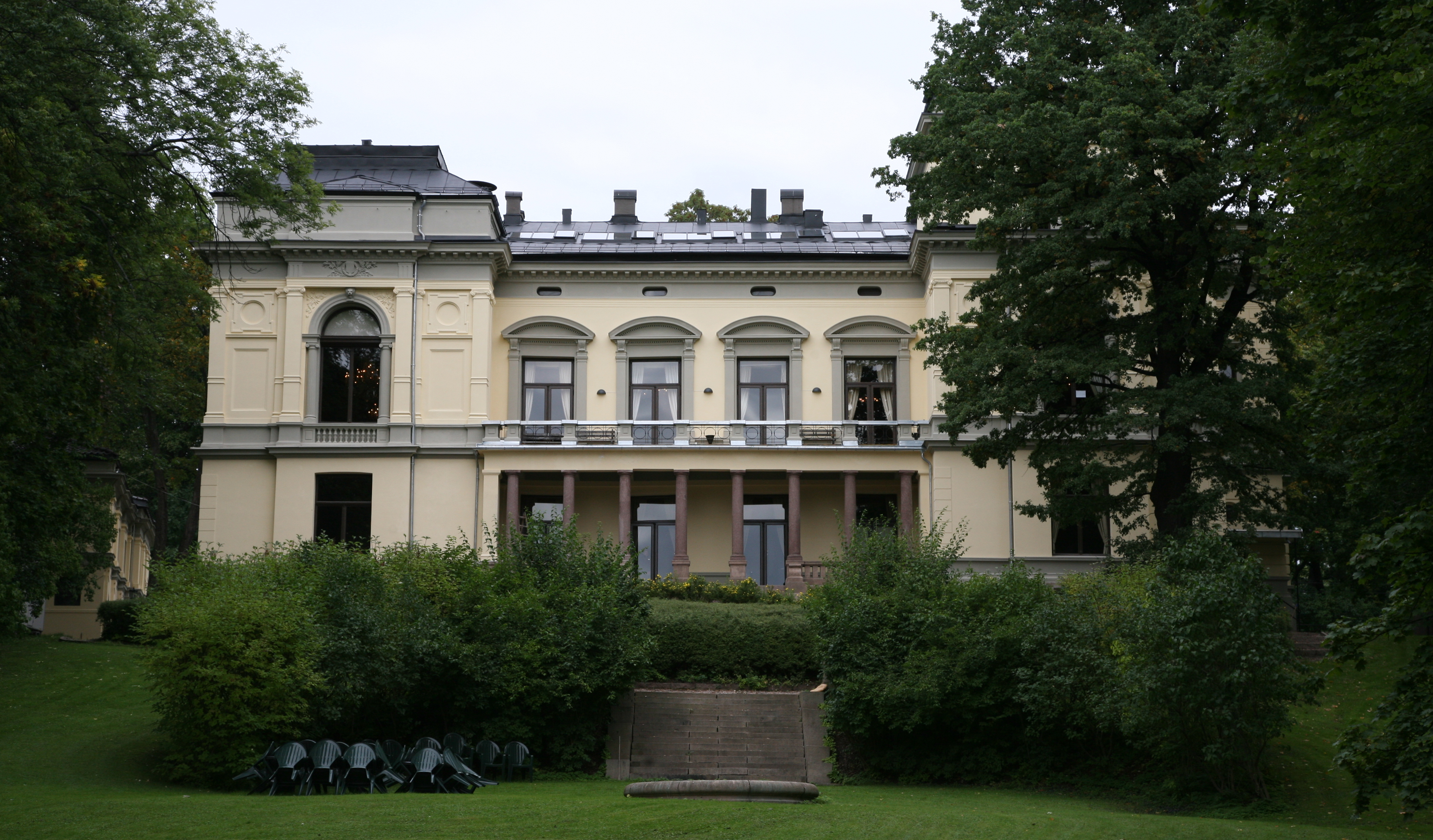 The building of Det Norske Videnskaps-Akademi in Drammensveien 78 in Oslo